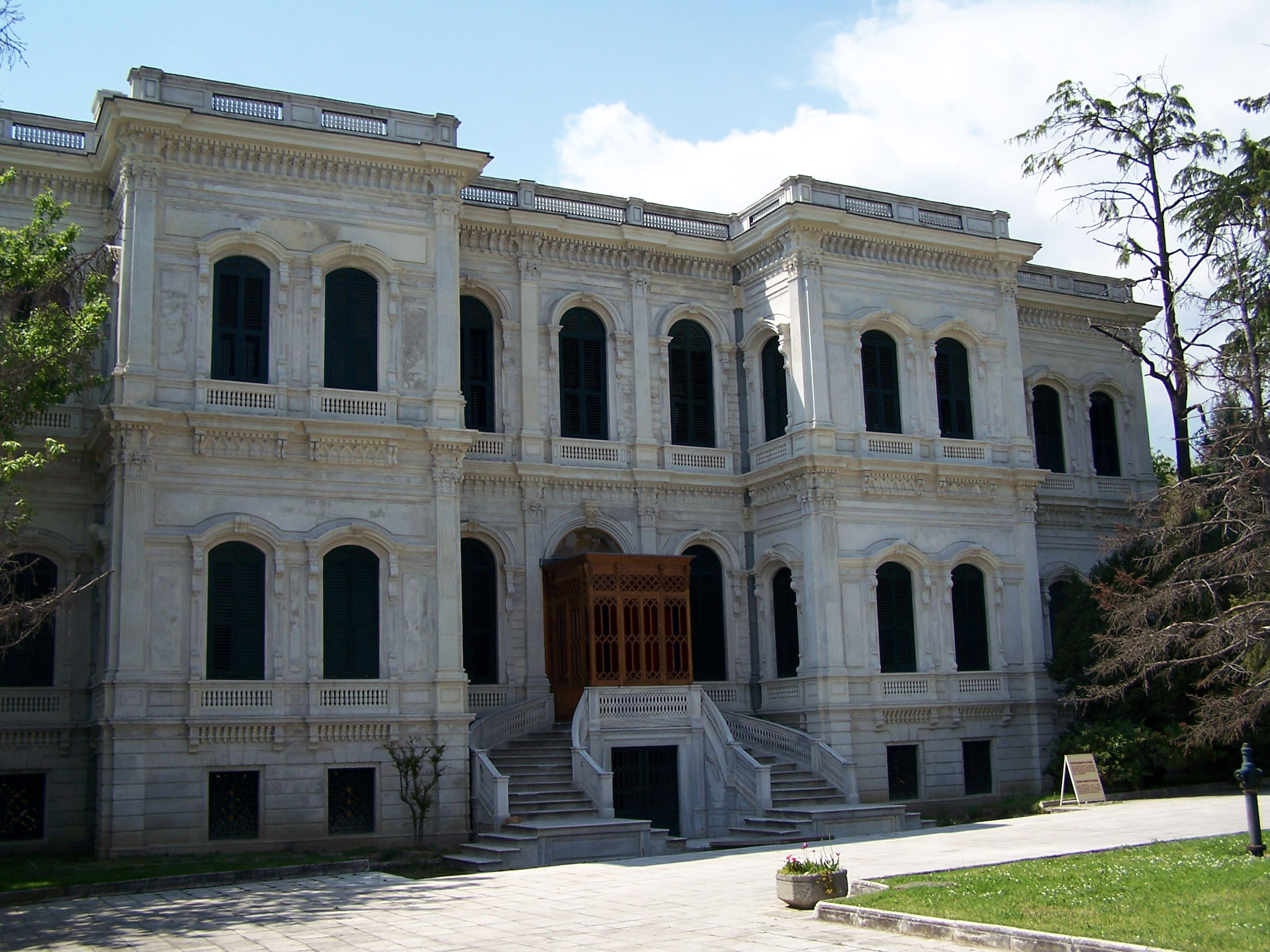 Büyük Mabeyn Köşkü, Yıldız Sarayı in Beşiktaş, İstanbul, Turkey